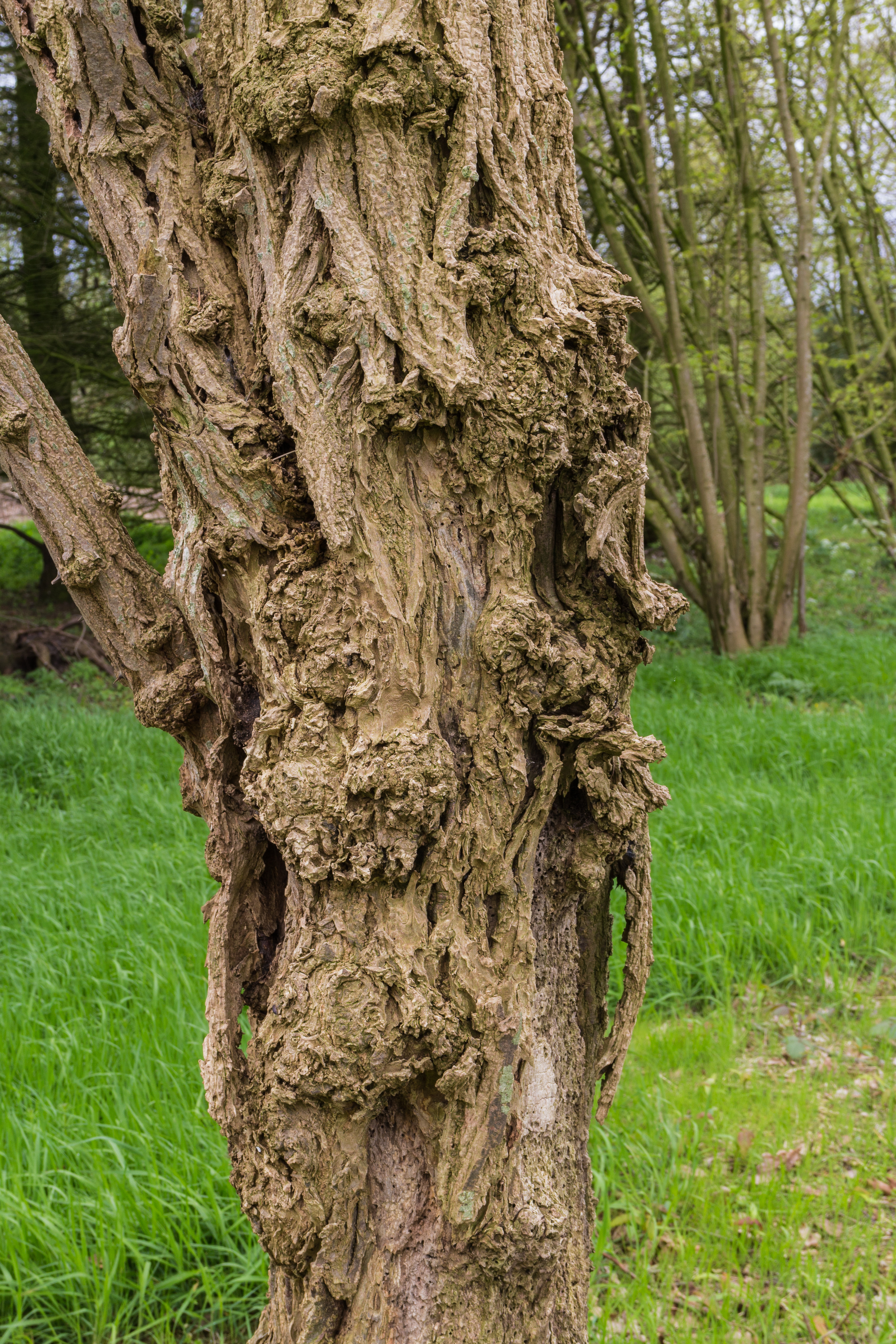 Stam van een dode robinia, valse acacia